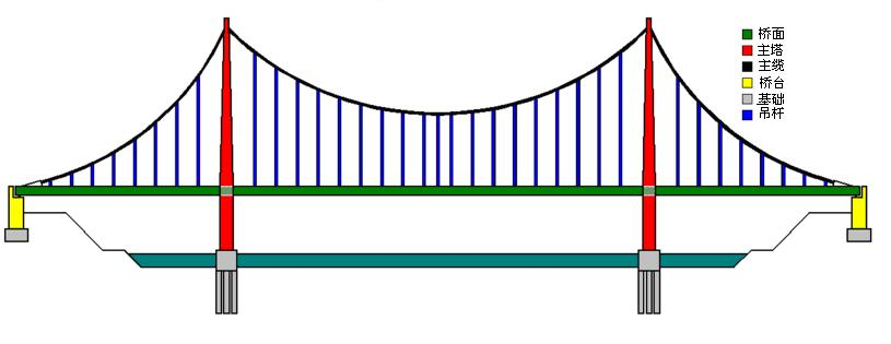 悬索桥各部分名称示意图